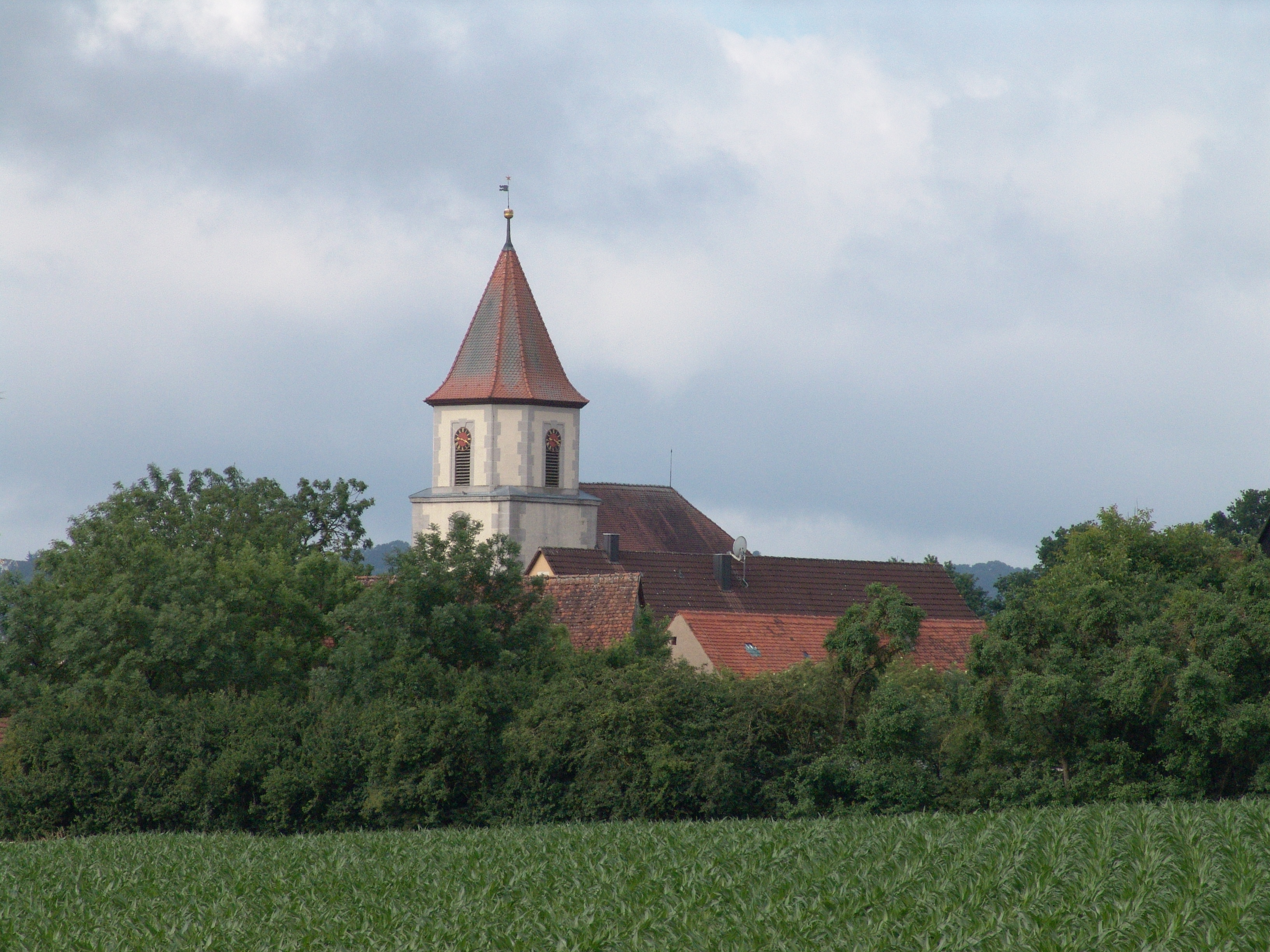 Gastenfelden St. Maria Magdalena